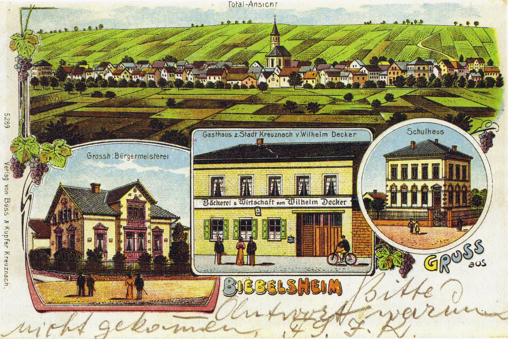 Gruß aus Biebelsheim, 1905 picture postcard.